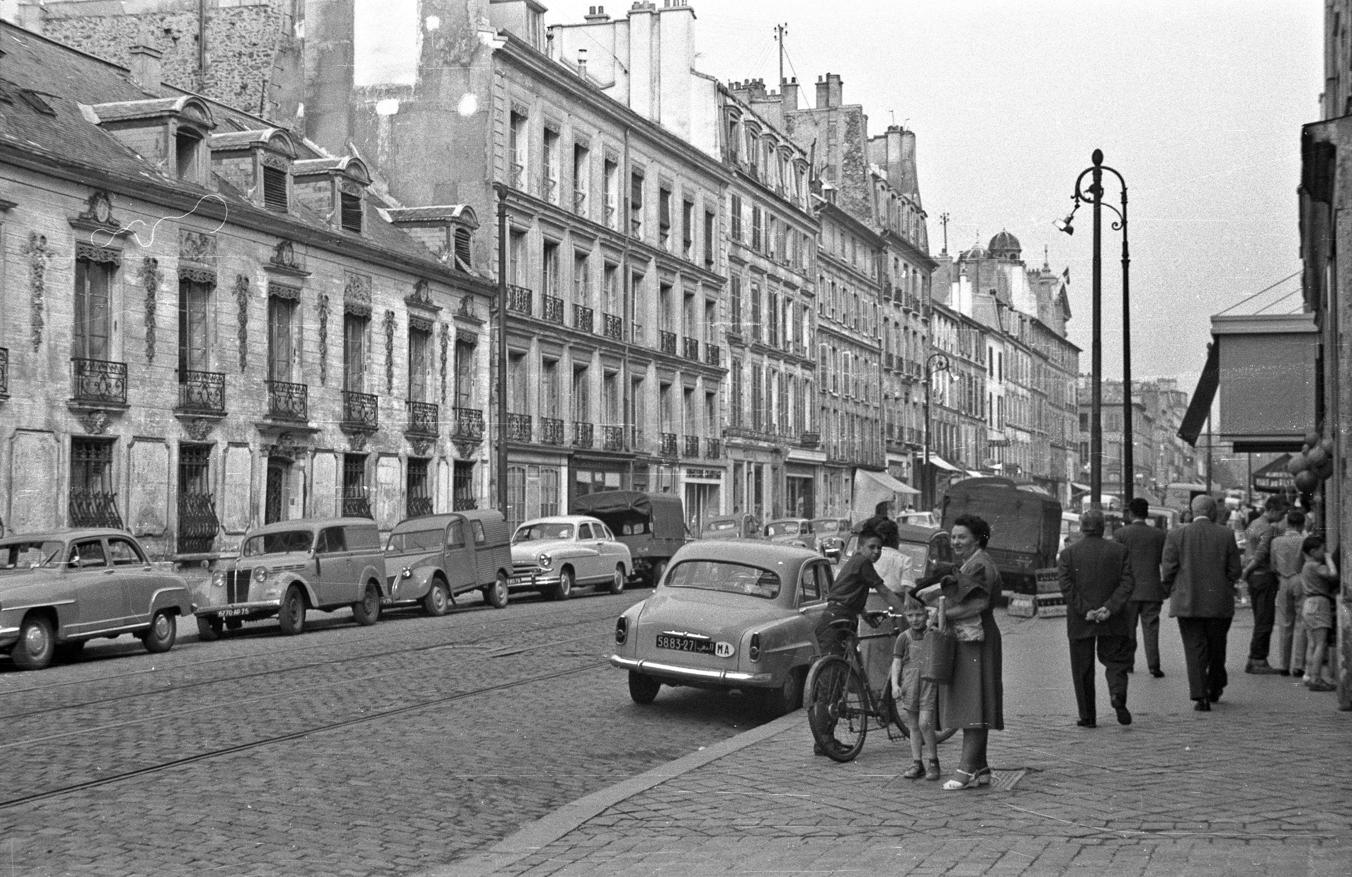 SRue de la Paroisse à Versailles (78) au niveau du numéro 11, fin des années 60 (le département des Yvelines (78) est créé en 1964 (cf. plaque d'immatriculation)). Au fond, l'église Notre-Dame.